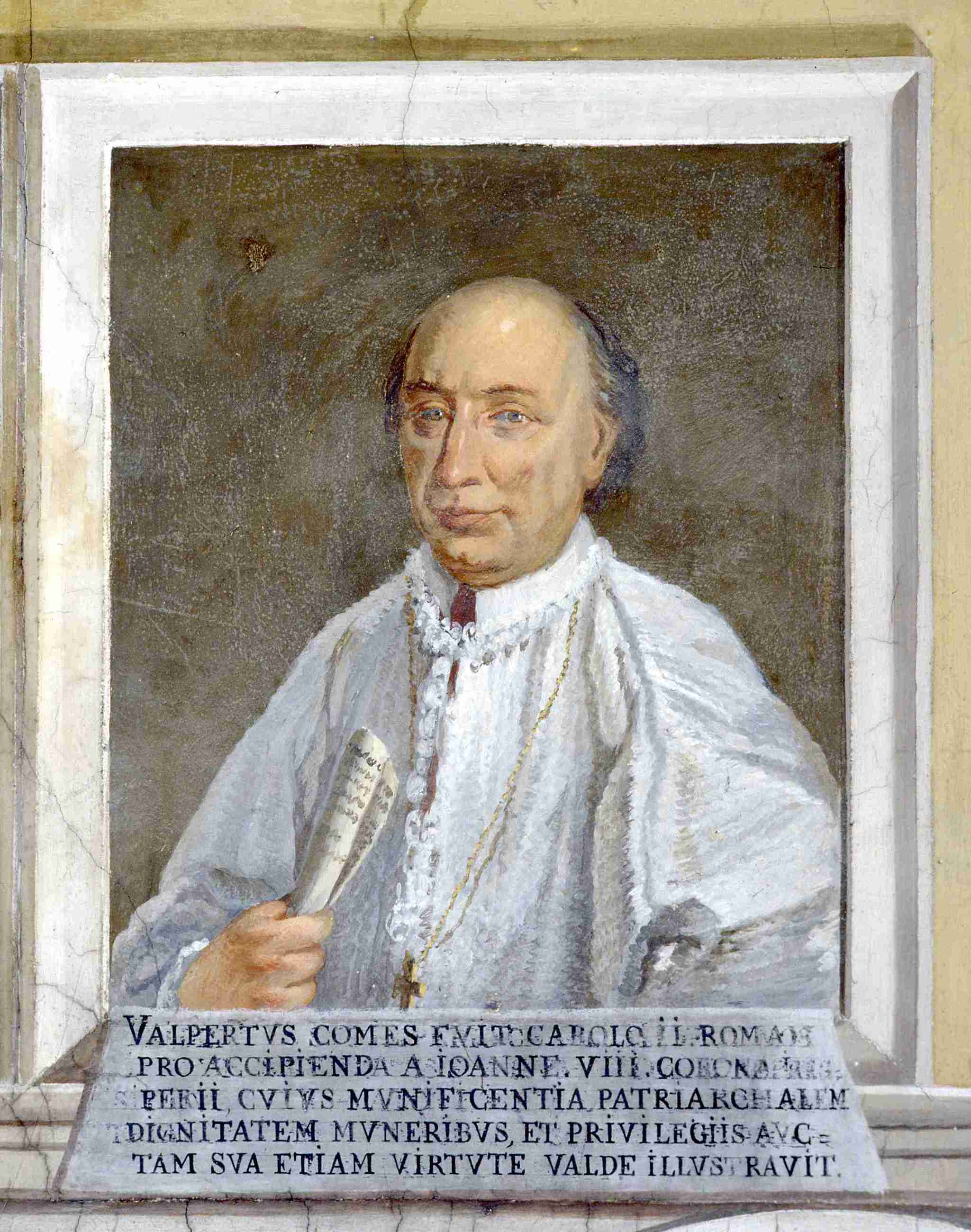 Valperto - Patriarcato Udine